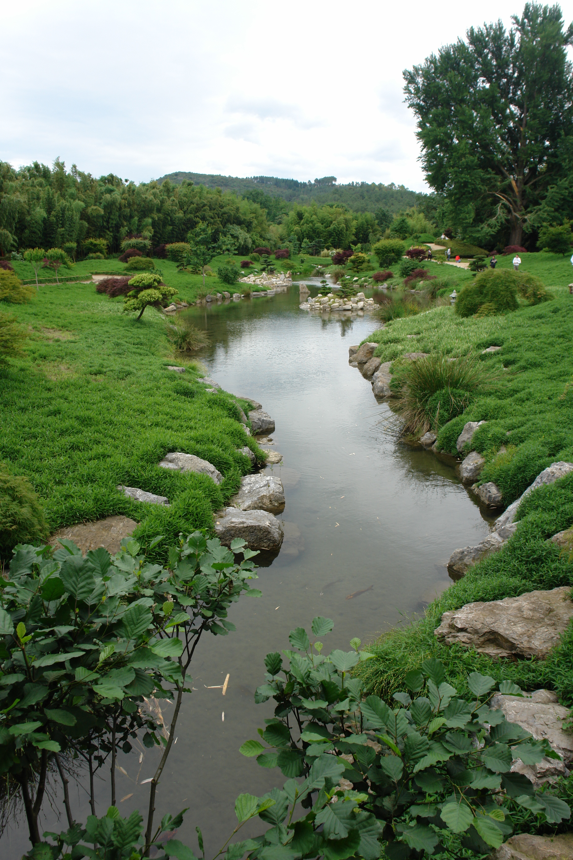 Jardin japonais, Bambouseraie de Prafrance, Anduse, Gard, France.